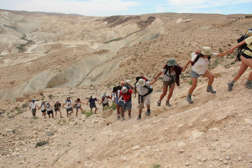 חניכי המכינה הקדם צבאית